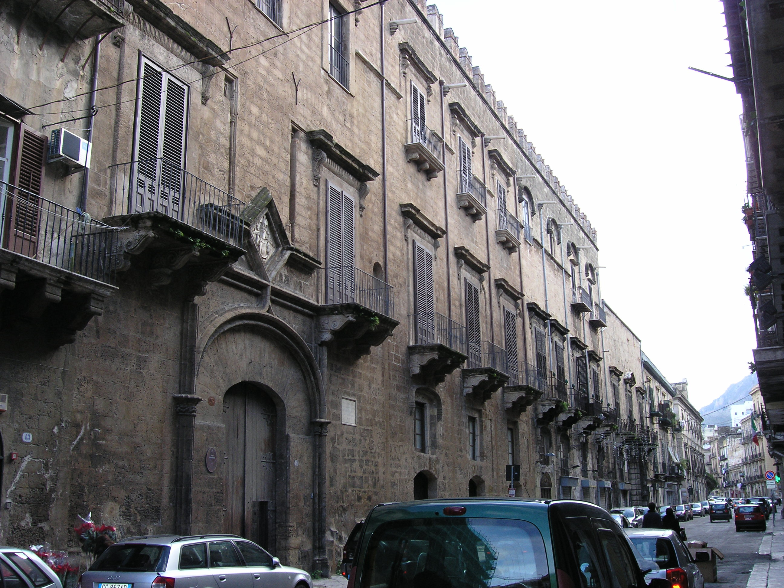 Sicilianu: Palazzu Aiutamicristu